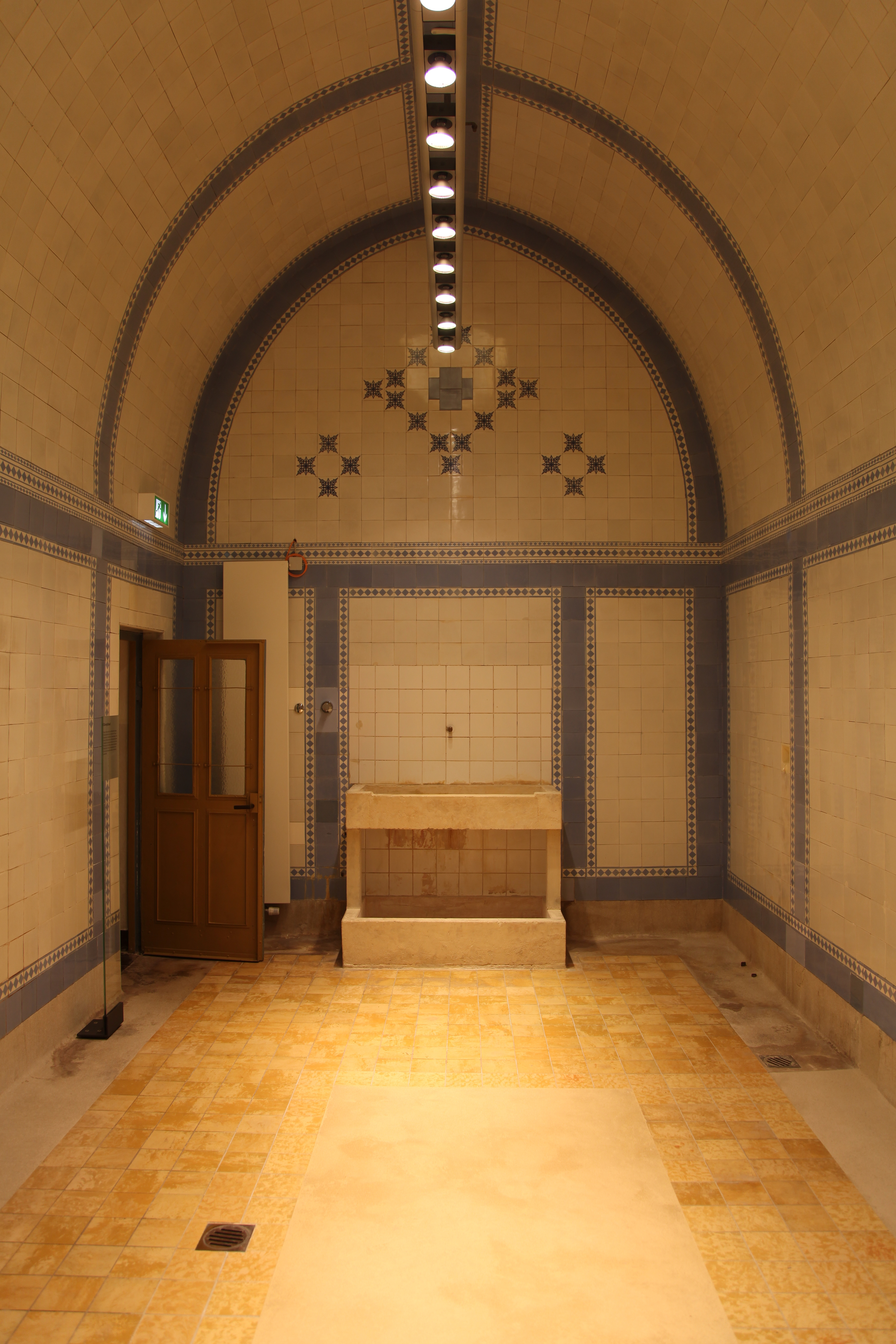 König-Karls-Bad, König-Karl-Straße 3 in Bad Wildbad